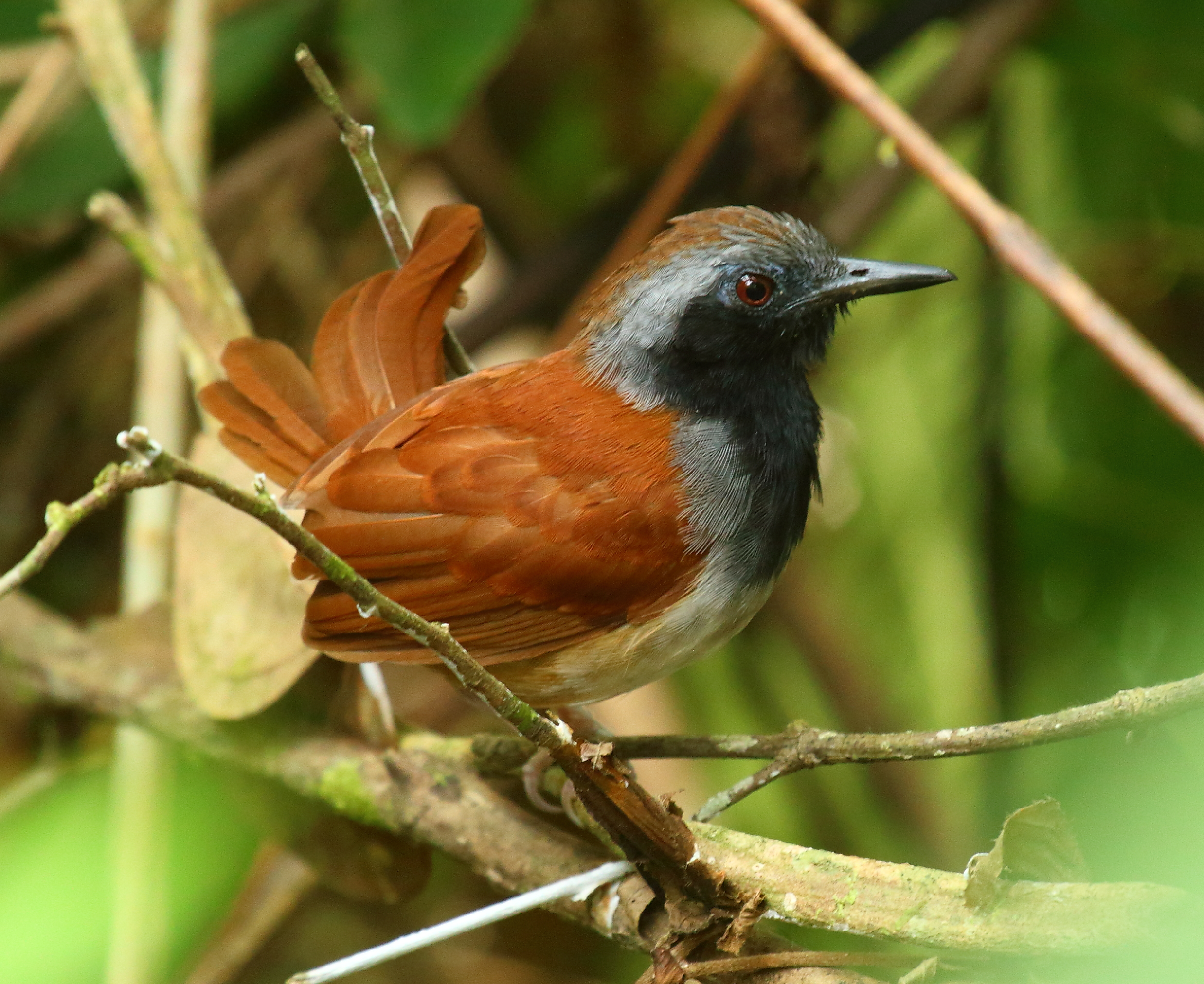 arima blanch road near Morne La Croix, Trinidad